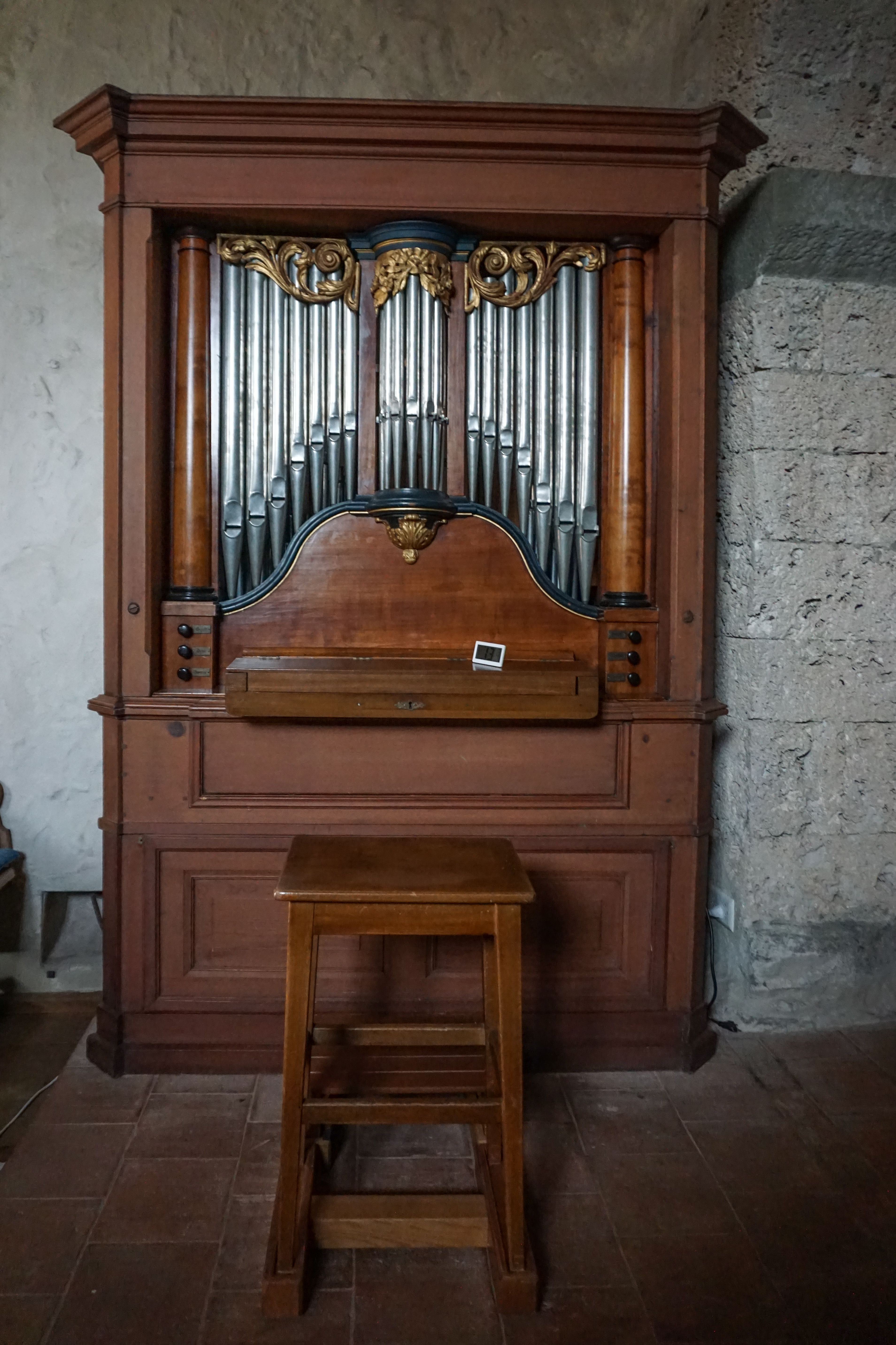 Rüti bei Lyssach, Kirche Orgel.